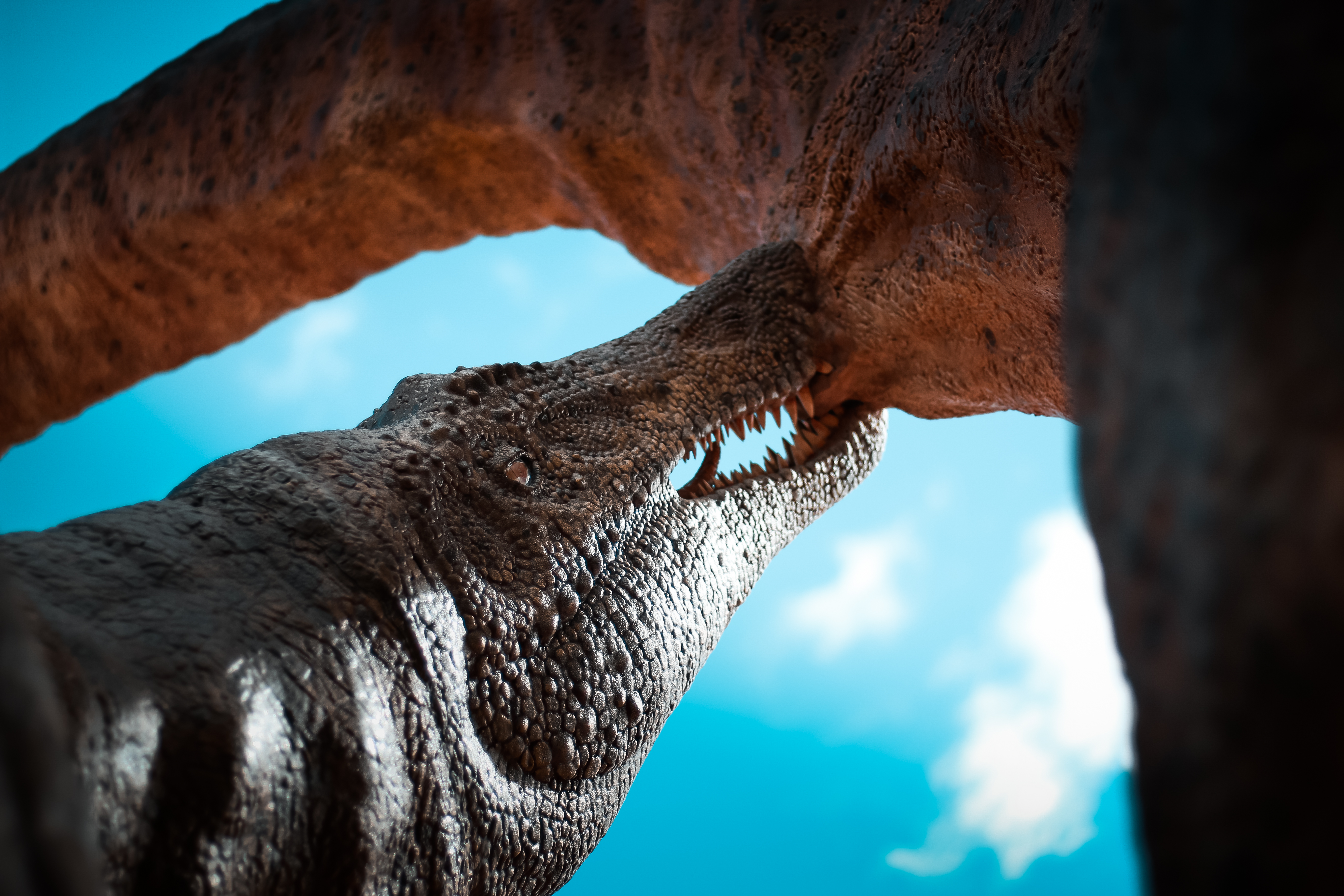 Escultura de dinosaurios peleando en el parque temático Dinópolis